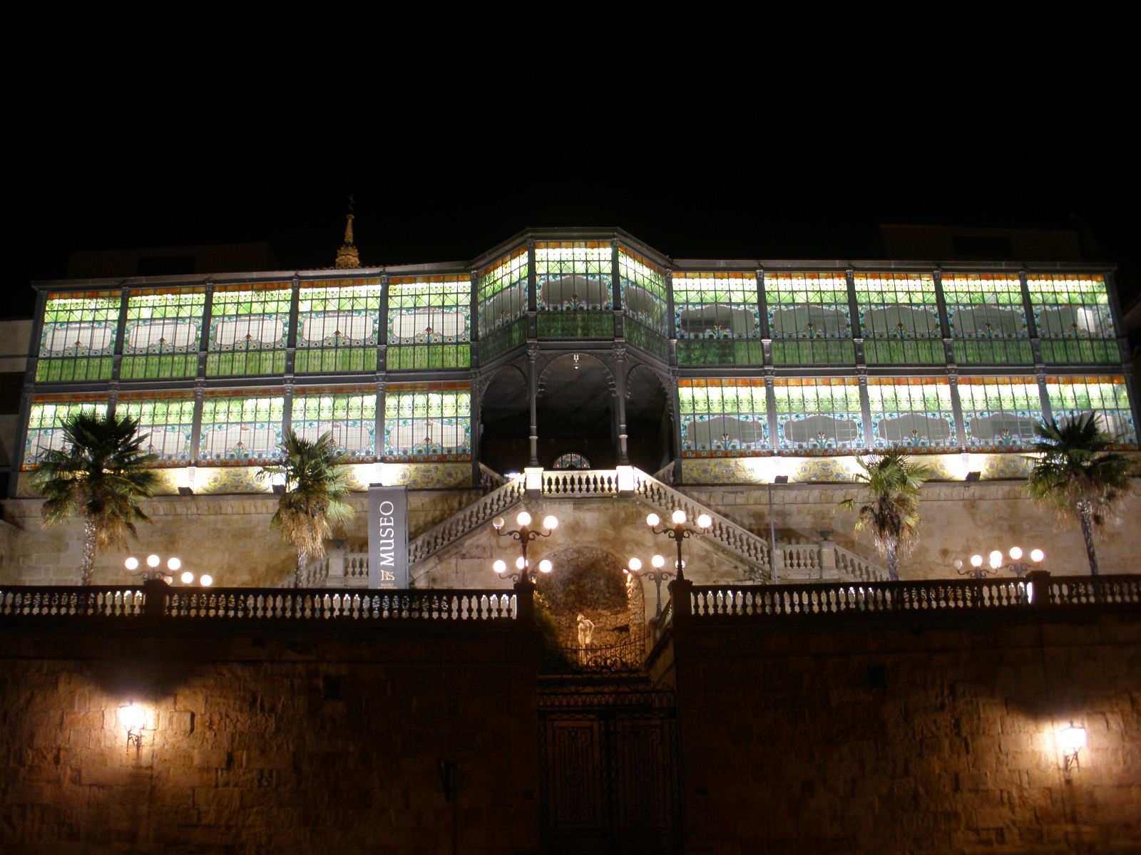 Salamanca - Museo Art Noveau y Art Déco (Casa Lis)